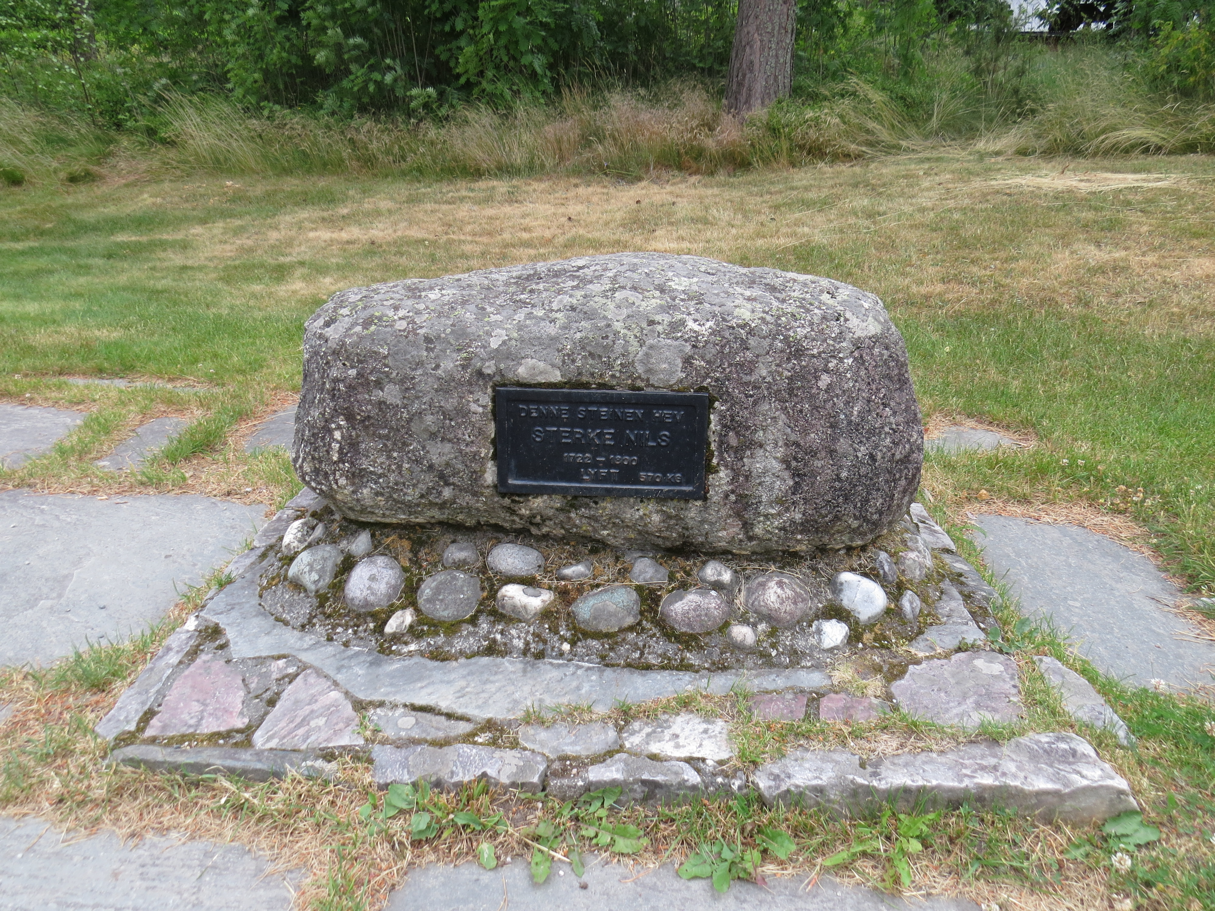 Denne steinen hev Sterke-Nils 1722–1800 lyft 570 kg, ved Seljord Kirke